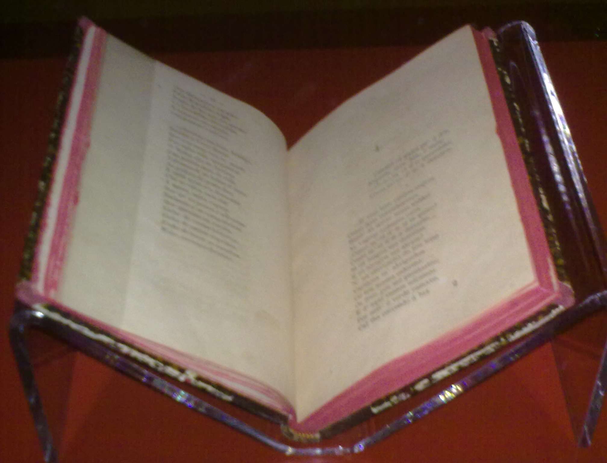 Primera edición de "Cantares gallegos", expuesta en la Cidade da Cultura (Santiago de Compostela) durante una muestra de libros históricos de trascendencia para el pueblo gallego.